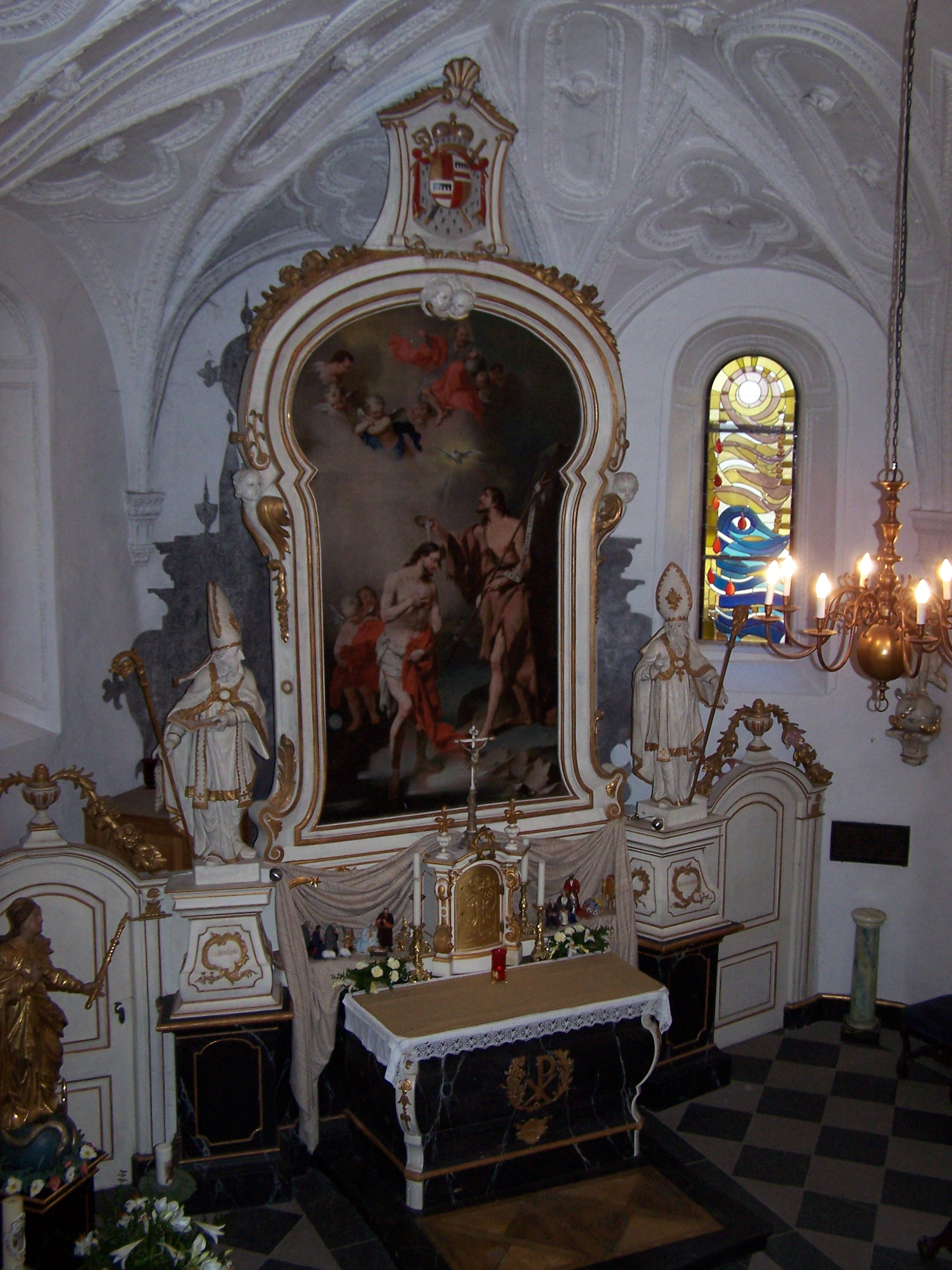 Schlosskapelle Schloss Laer (Meschede): Altar